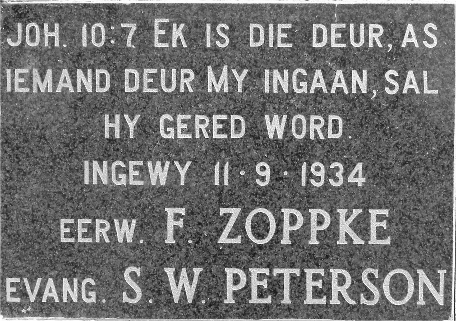 Hoeksteen van die Evangelies-Lutherse Kerk in Progress, Upington, Suid-Afrika